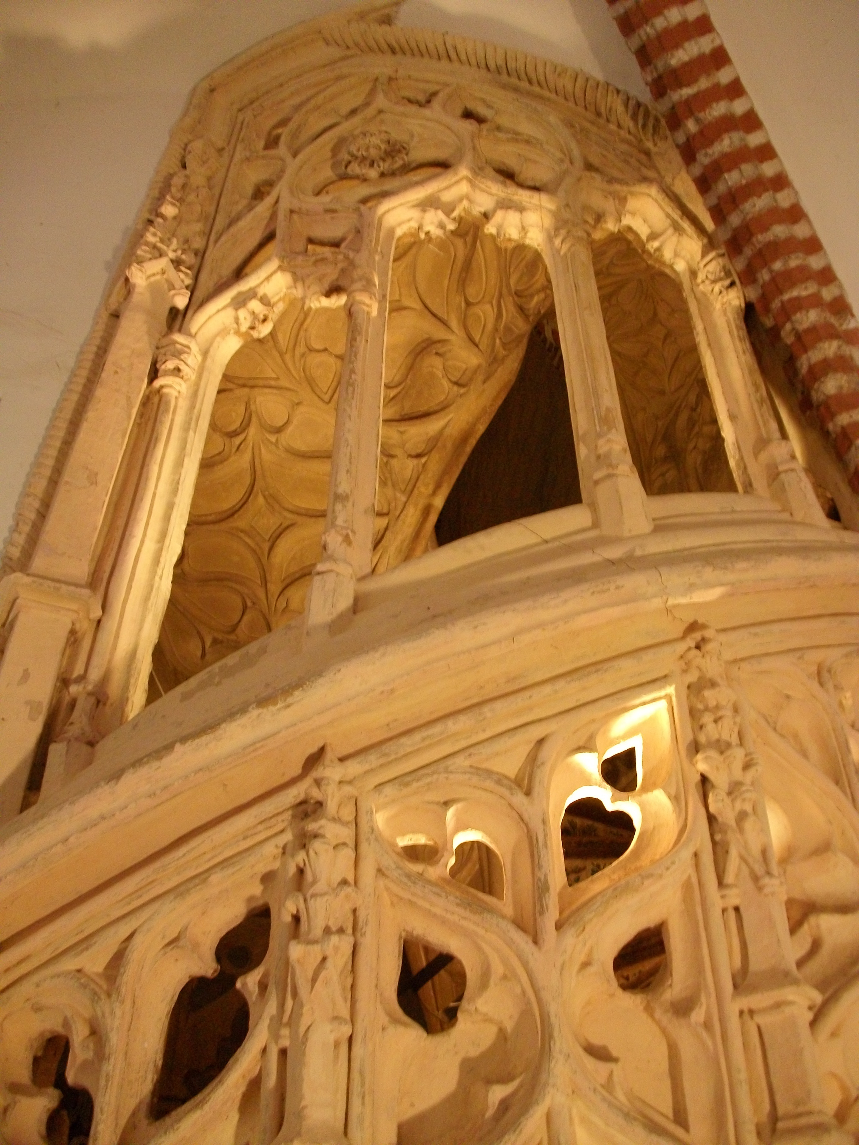 Escala gòtica flamígera al monestir de Sant Jeroni de Cotalba.